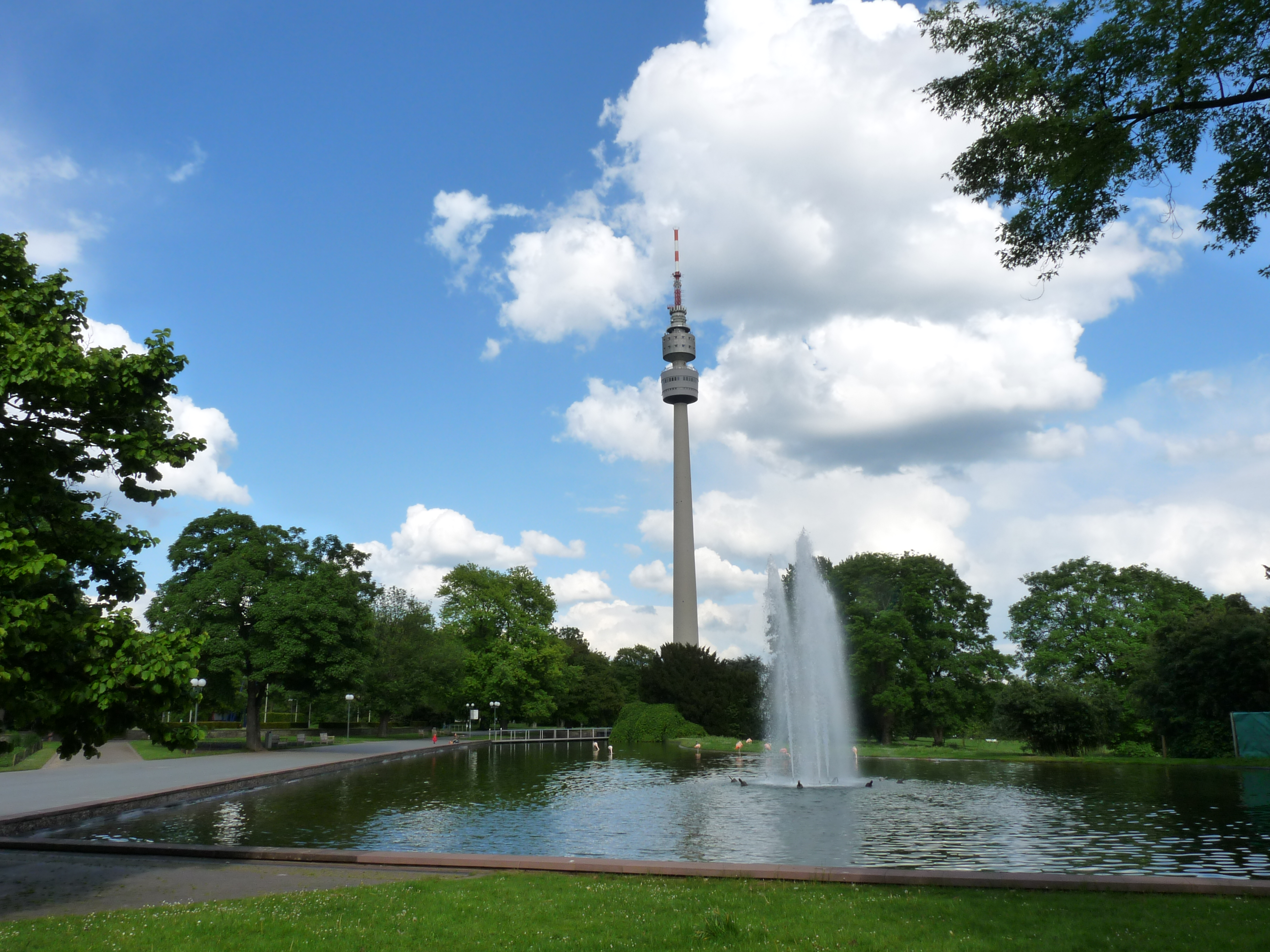 Florianthurm i wieża telewizyjna